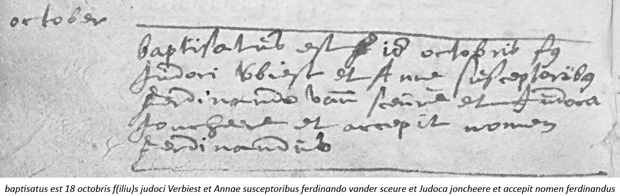 baptisatus est 18 octobris (1623) f(iliu)s judoci Verbiest et Annae susceptoribus ferdinando vander sceure et Judoca joncheere et accepit nomen ferdinandus